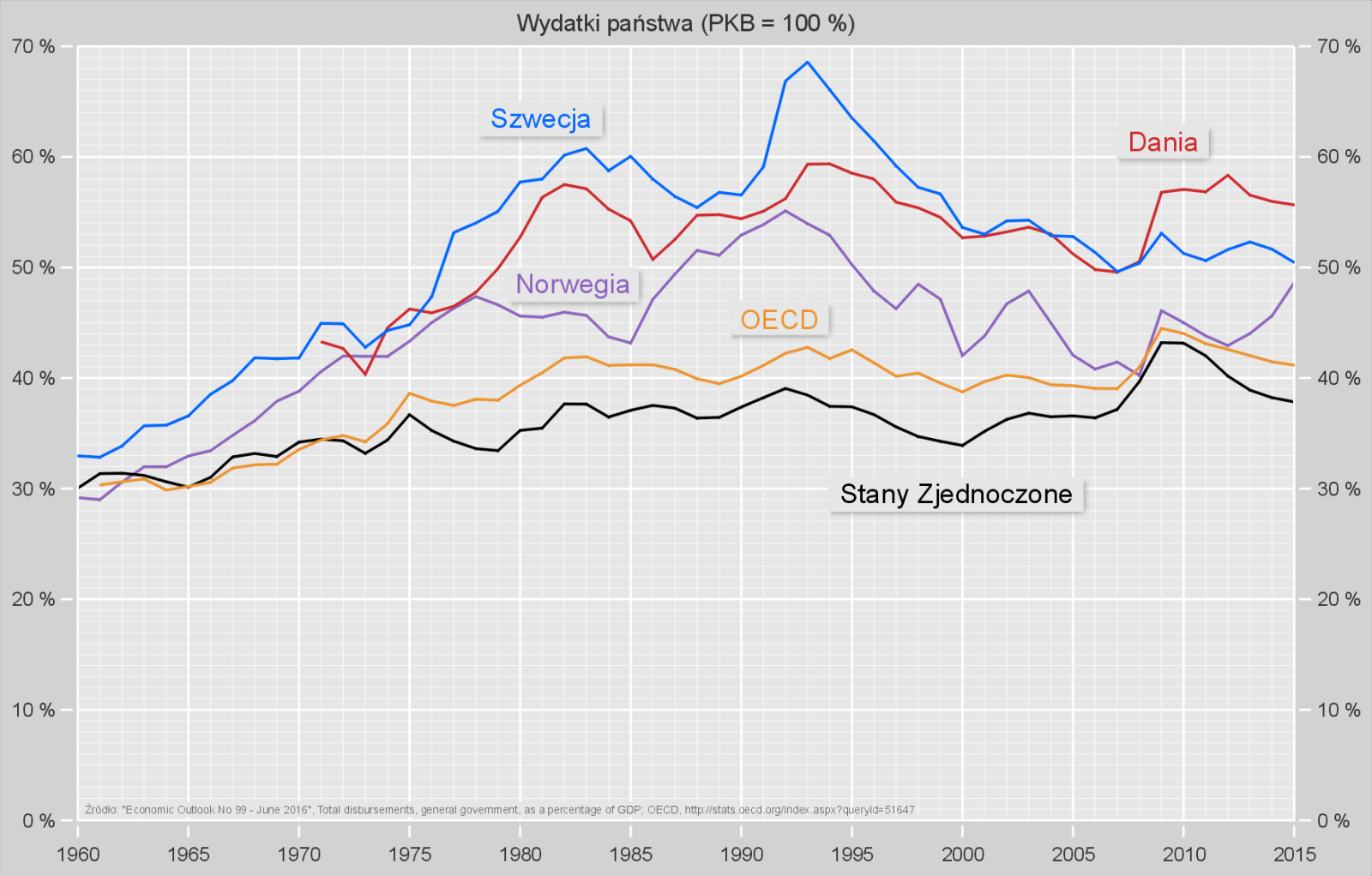 Wydatki publiczne w krajach skandynawskich, Stanach Zjednoczonych i krajach OECD ogółem (PKB = 100%). Źródło: "Economic Outlook No 99 - June 2016", Total disbursements, general government, as a percentage of GDP; OECD